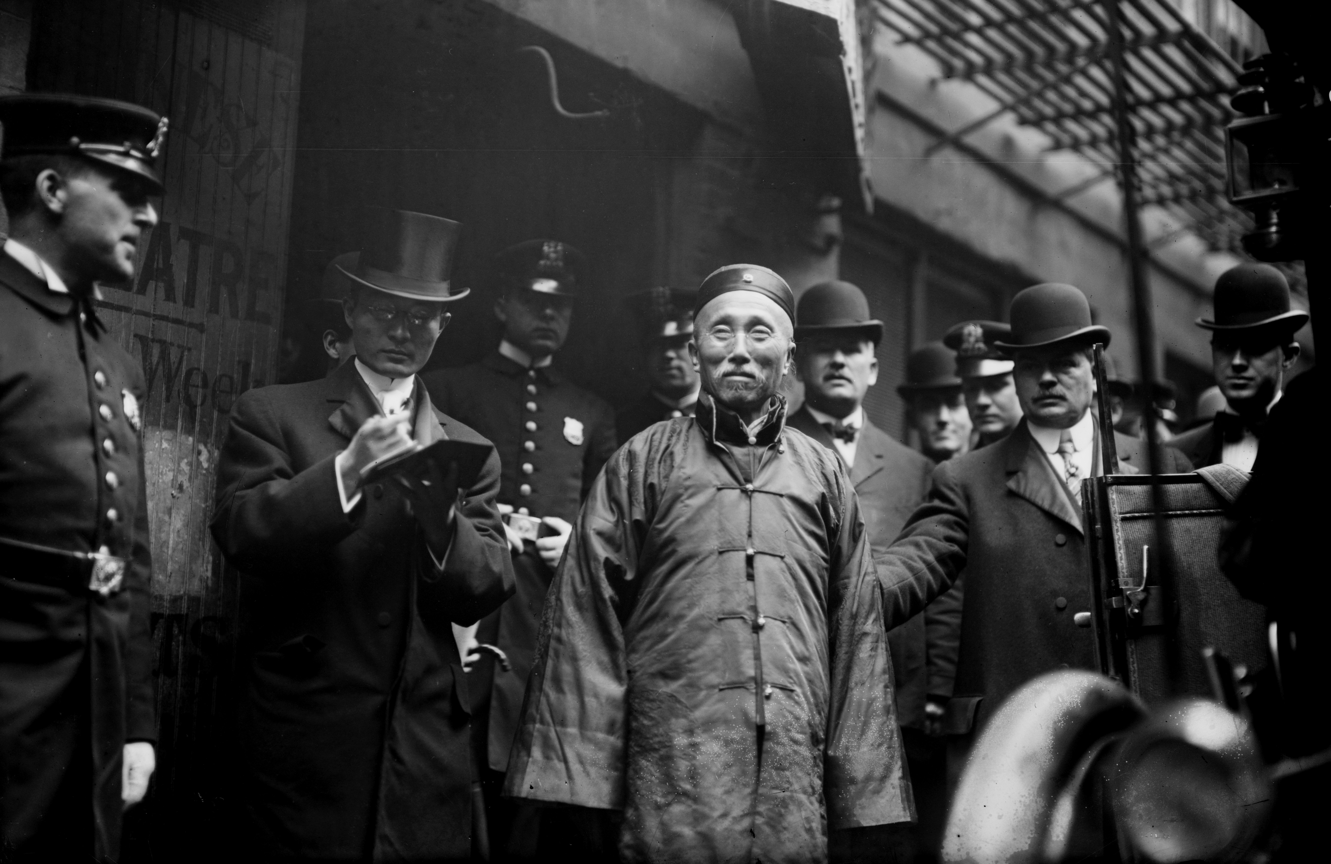 Wu Tingfang